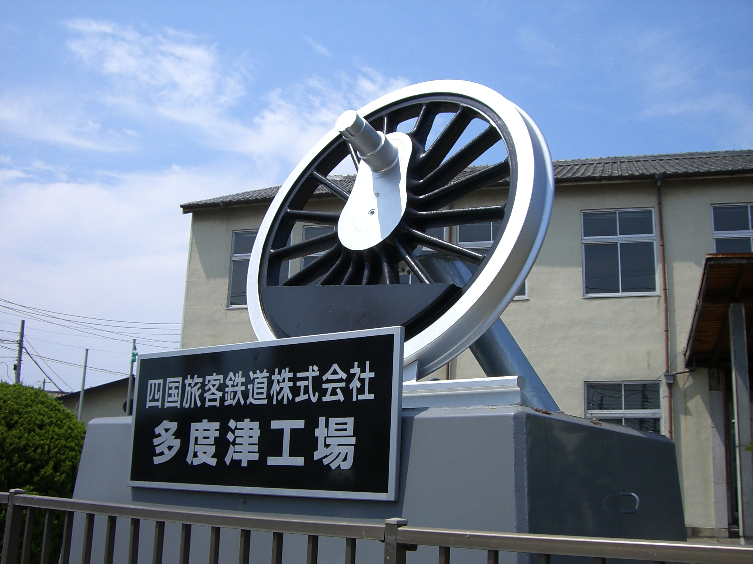 JR Shikoku Tadotsu Factory